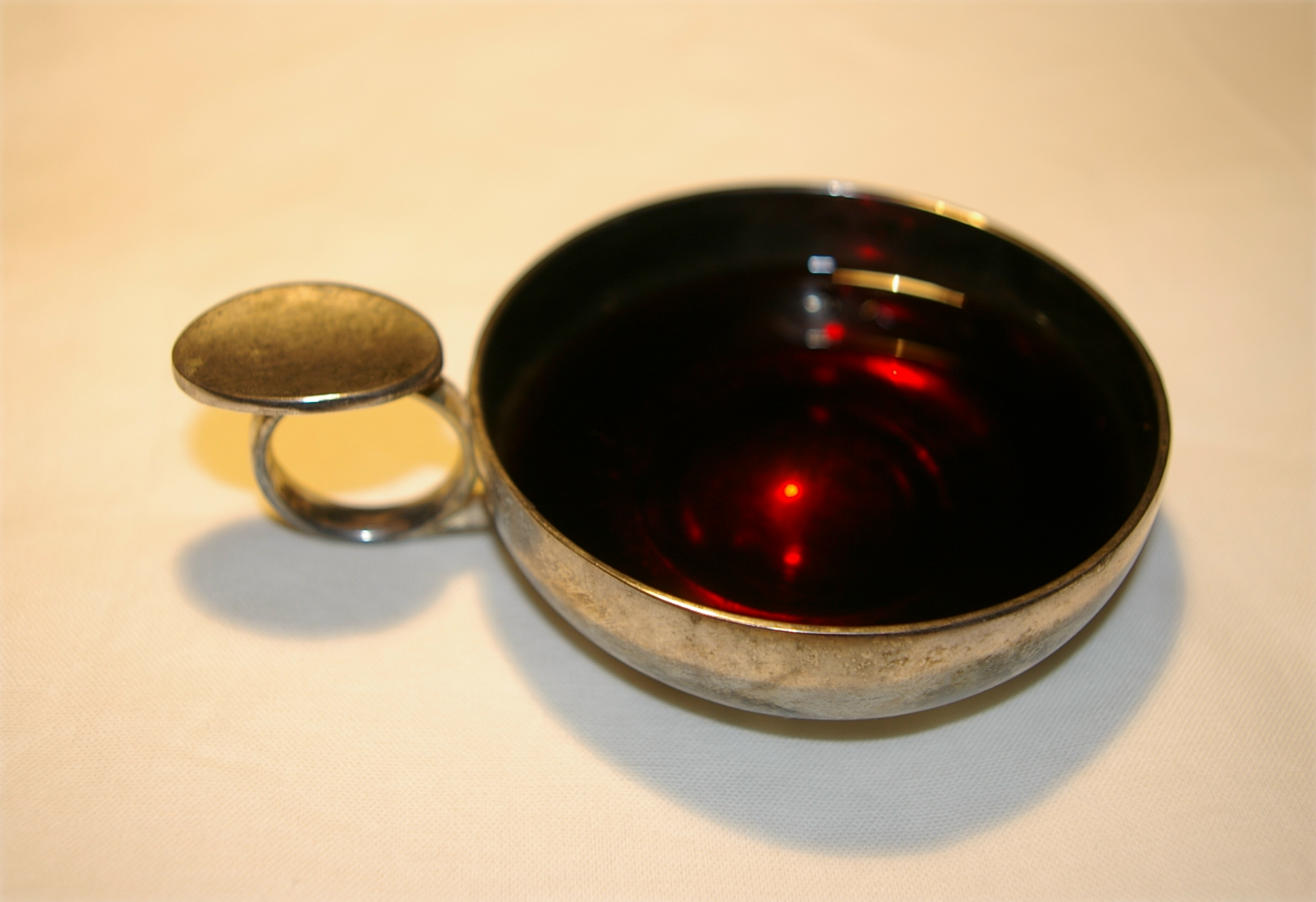 Tastevin mit bordelaiser Füllung (Château La Tour de By Jg. 2000), eigener Tastevin, eigener Wein, eigenes Foto vom 16.04.2006